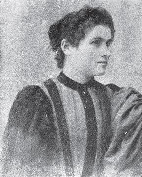 Мария Думбалакова.